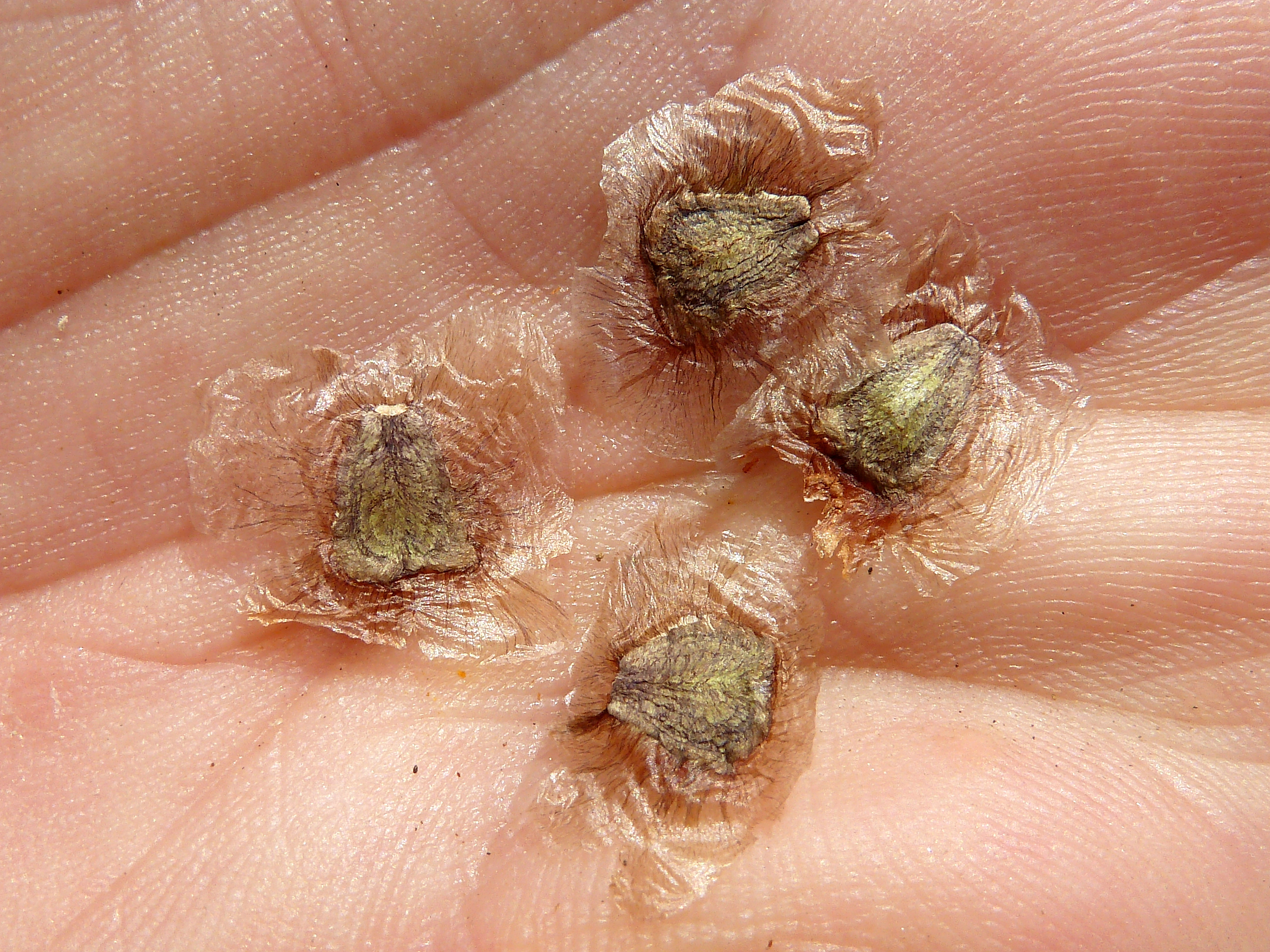 Jacaranda mimosifolia D. Don - Semillas sueltas con ala membranácea - Rambla del Charco, Águilas (Murcia, España).